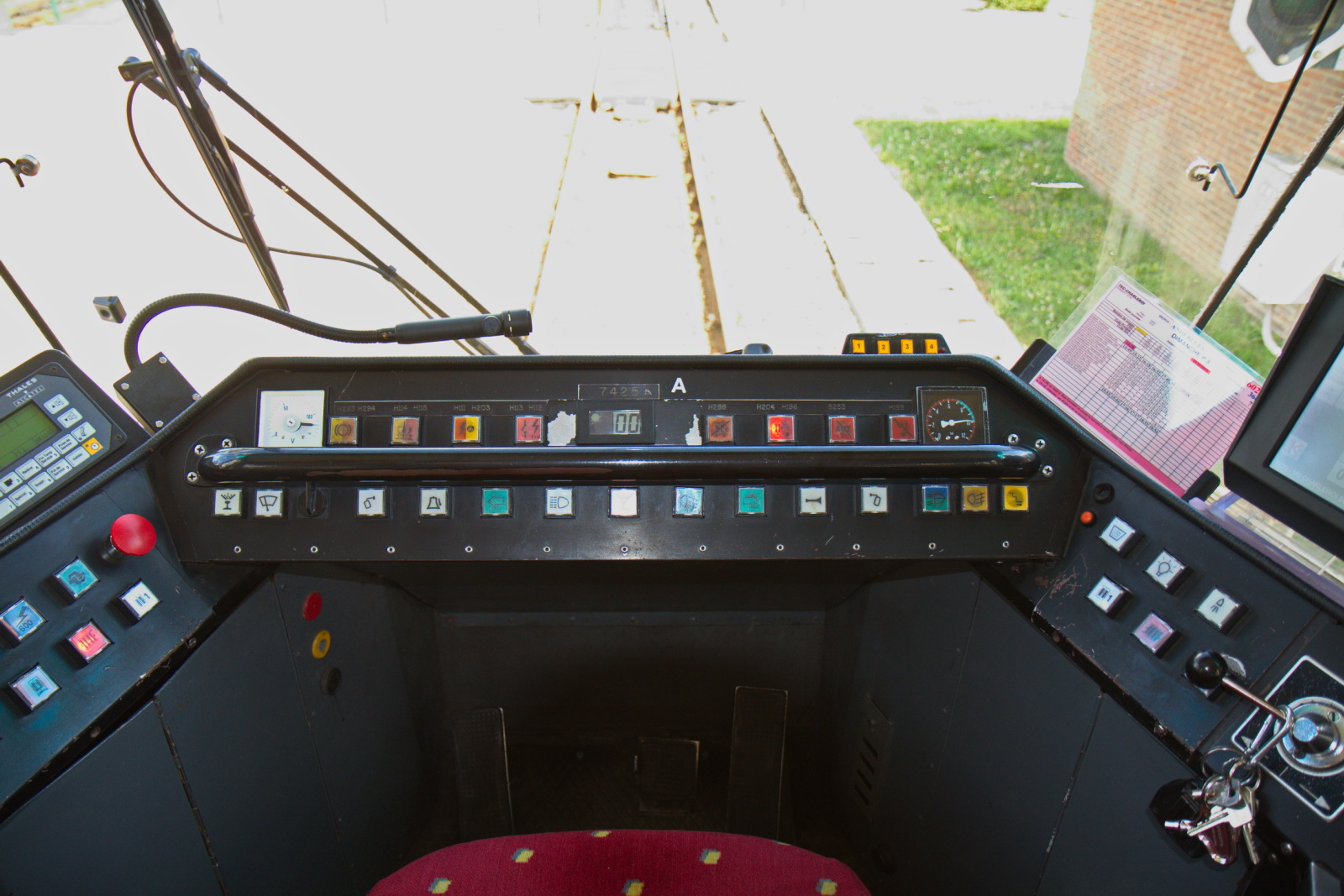 Vue du poste de conduite de la motrice 7425 du TEC Charleroi.